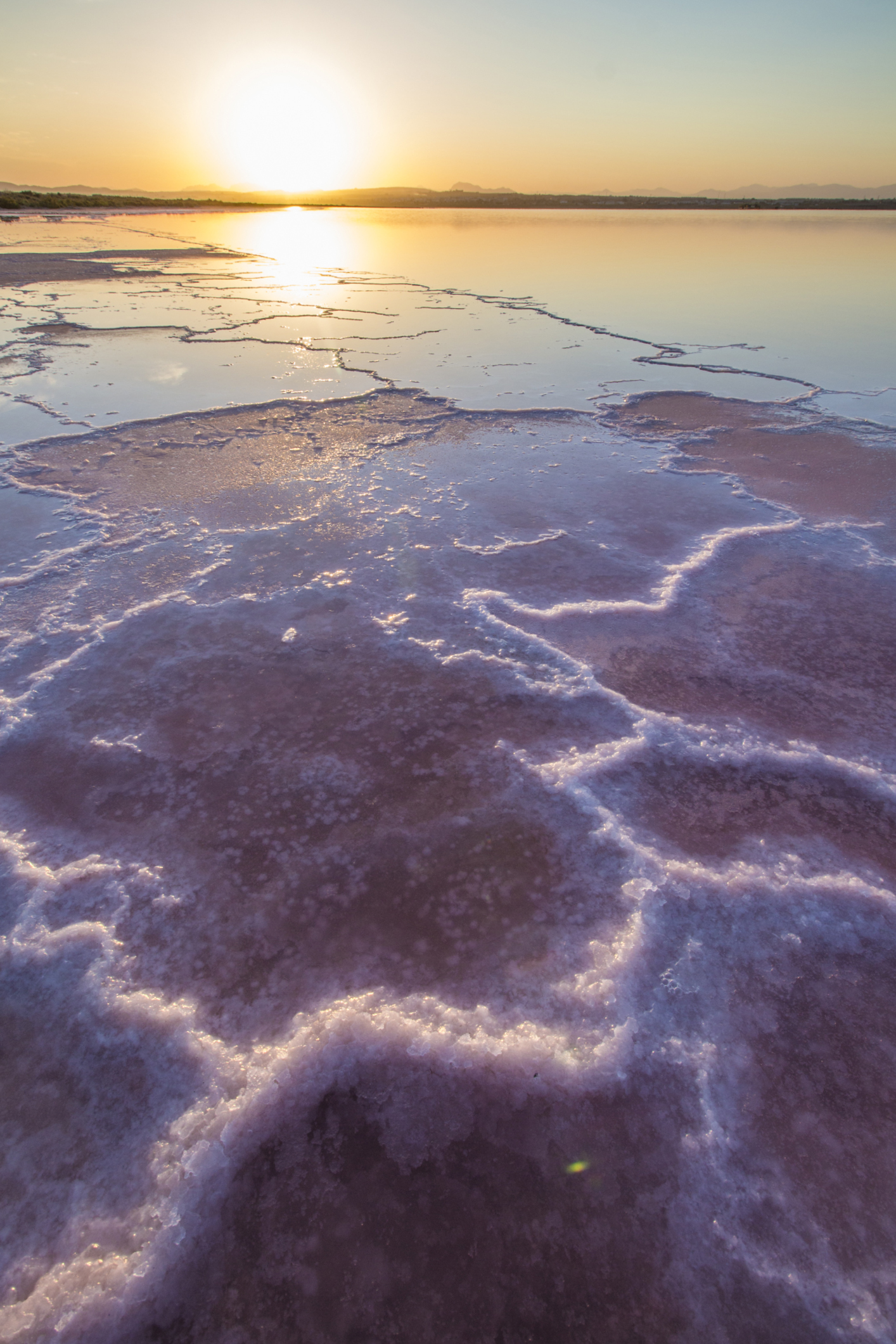 Parque natural de las Lagunas de La Mata y Torrevieja This is a photography of a Site of Community Importance in Spain with the ID: ES0000059. Natura2000 entry, EEA entry